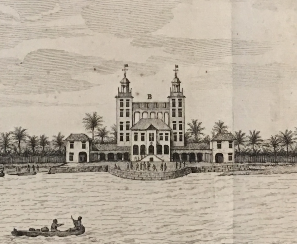 Palácio de Friburgo da Cidade Maurícia (detalhe de FRIBVRGVM, gravura de Frans Post, c. 1643).